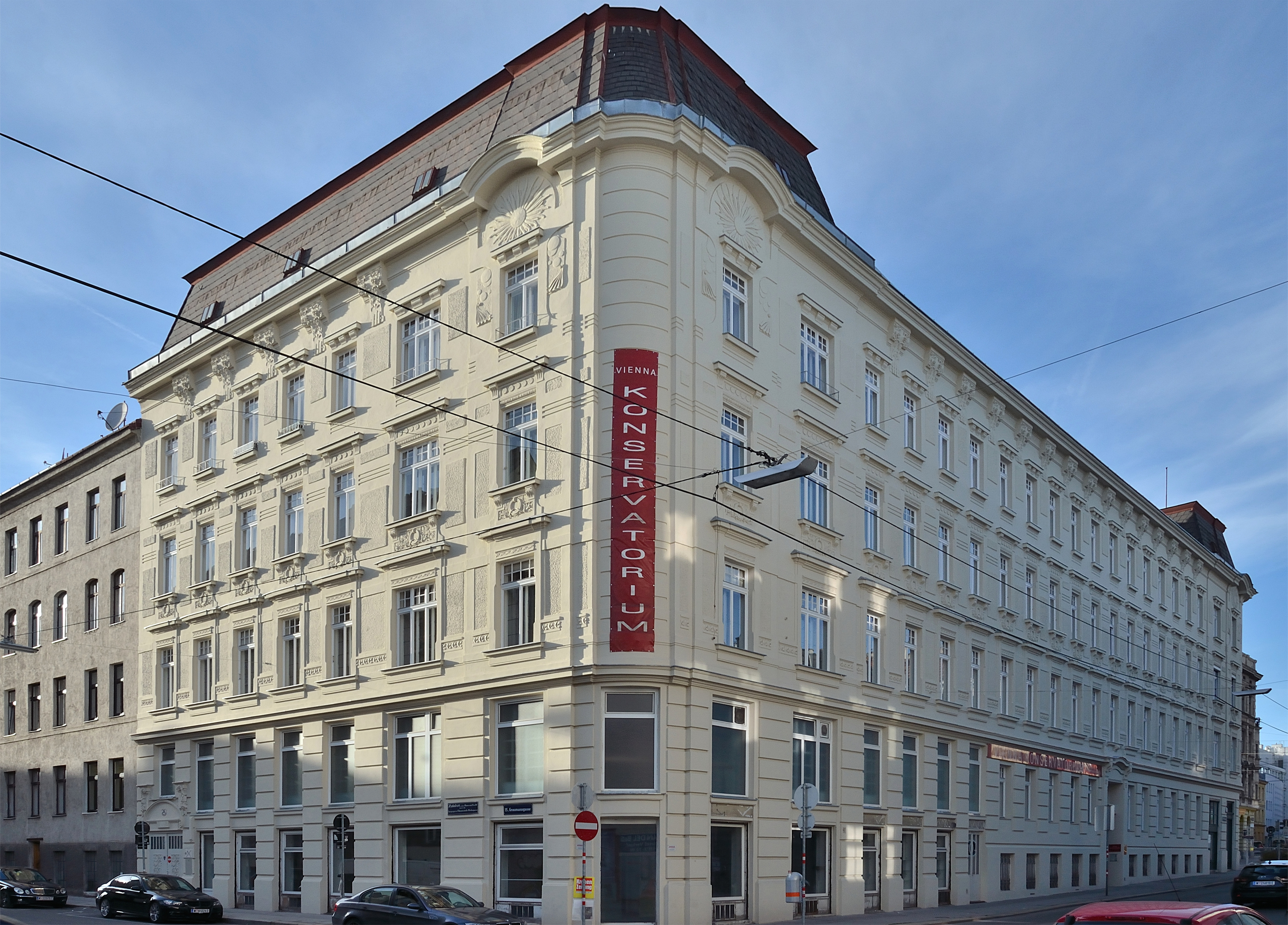 Graumanngasse 36 (links) / Stiegergasse 15-17 (rechts). Das Haus Stiegergasse 15-17 wurde 1902 nach Plänen von Adolf Langer erbaut.